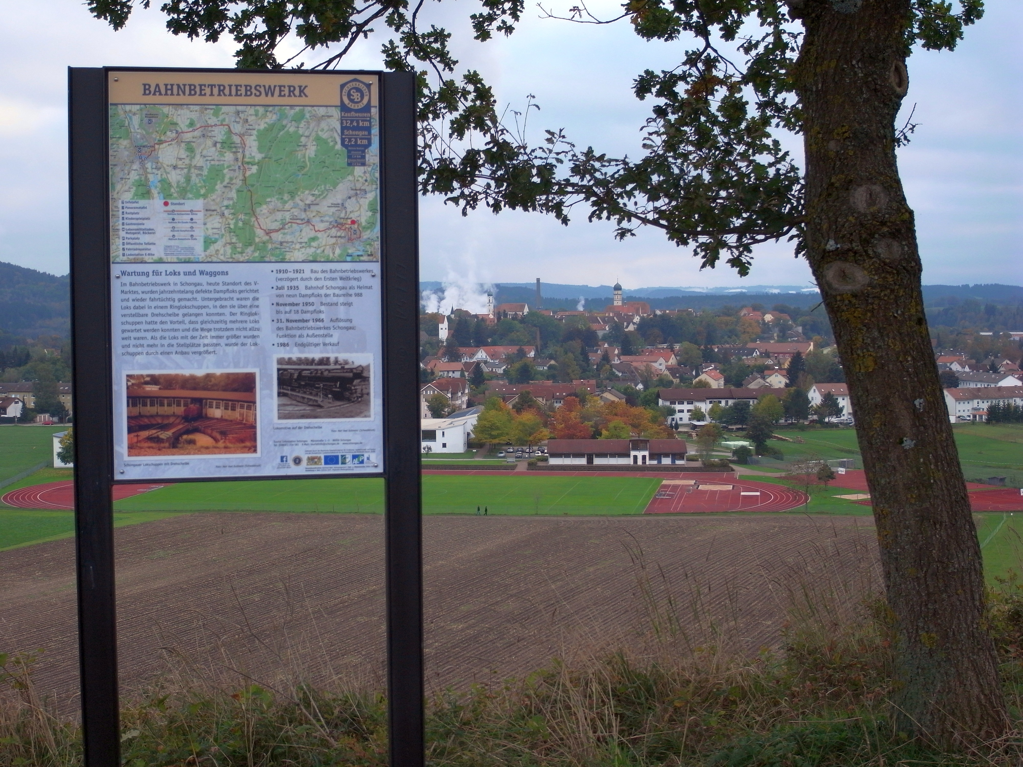 Sachsenrieder-Bähnle-Infotafel an Siechenhalde nördlich der Schongauer Altstadt, mit Blick über dieselbe. Der Radwanderweg verläuft hier westlich des Schongauer Krankenhauses am Hochufer der prähistorischen Lechs, der hier nach dem Durchbruch südlich des Altstadtbergs trockengefallen war. Die namengehende Bahntrasse verläuft hier kurz nach ihrem an einer noch vorhandenen Weiche kenntlichen Abzweig von der Strecke Schongau–Landsberg etwa 50 Meter weiter nördlich durch die Äcker. Thema der Infotafel ist das Bahnbetriebswerk, das früher als Teil des Bahnhofs Schongau existierte.